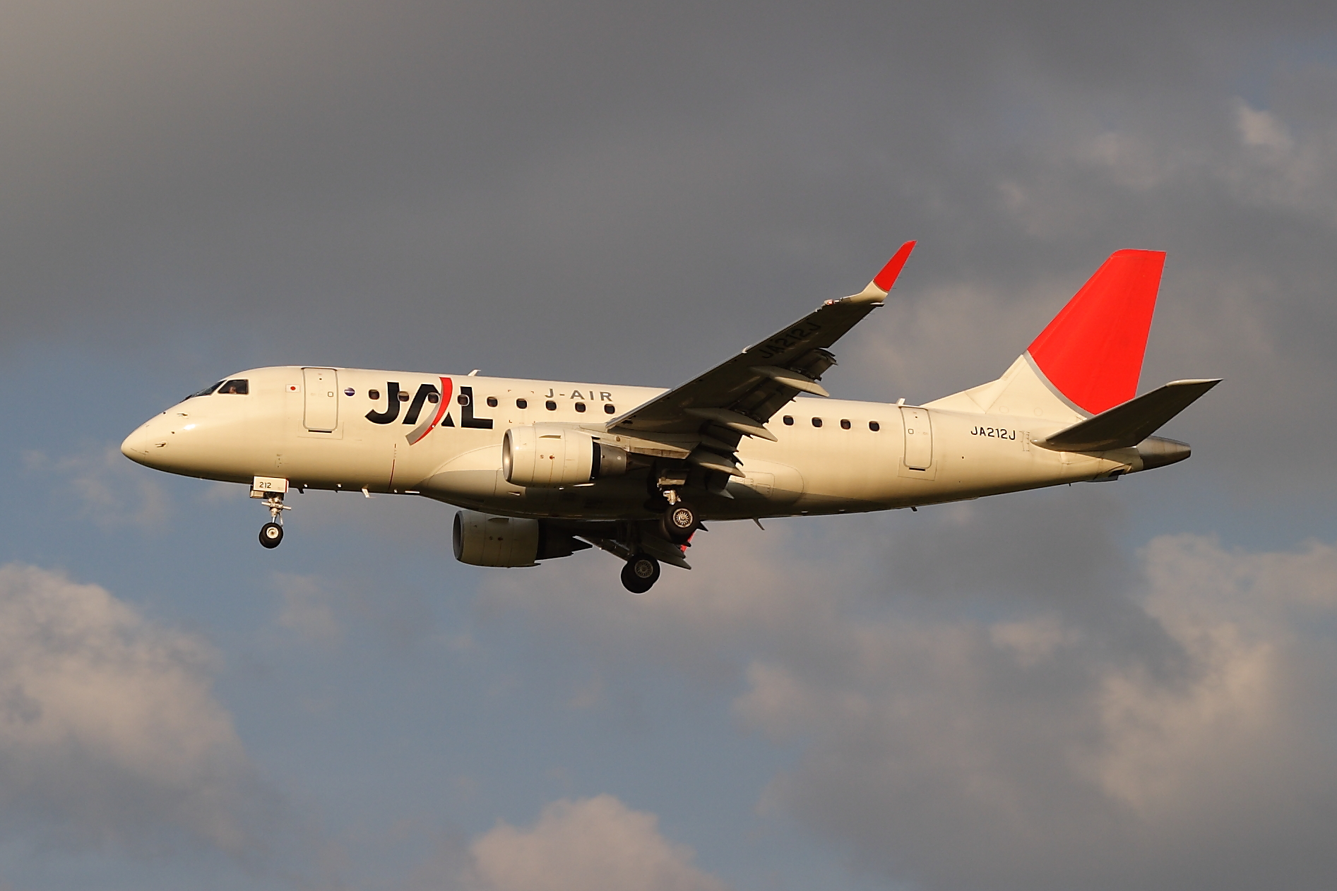 ジェイエア エンブラエル 170-100STD 福岡空港